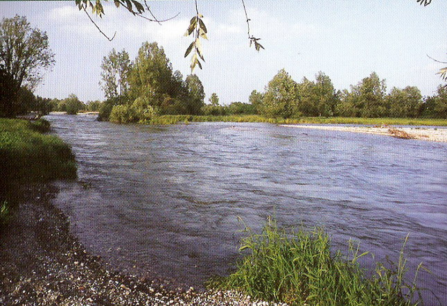 Il fiume Chiese presso Carpenedolo